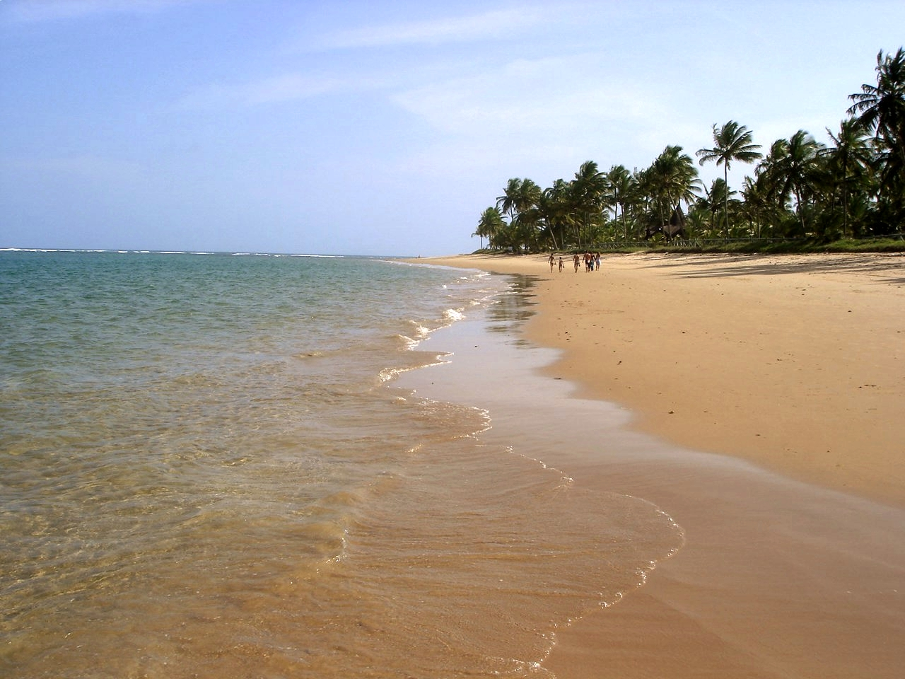 Taipus de Fora